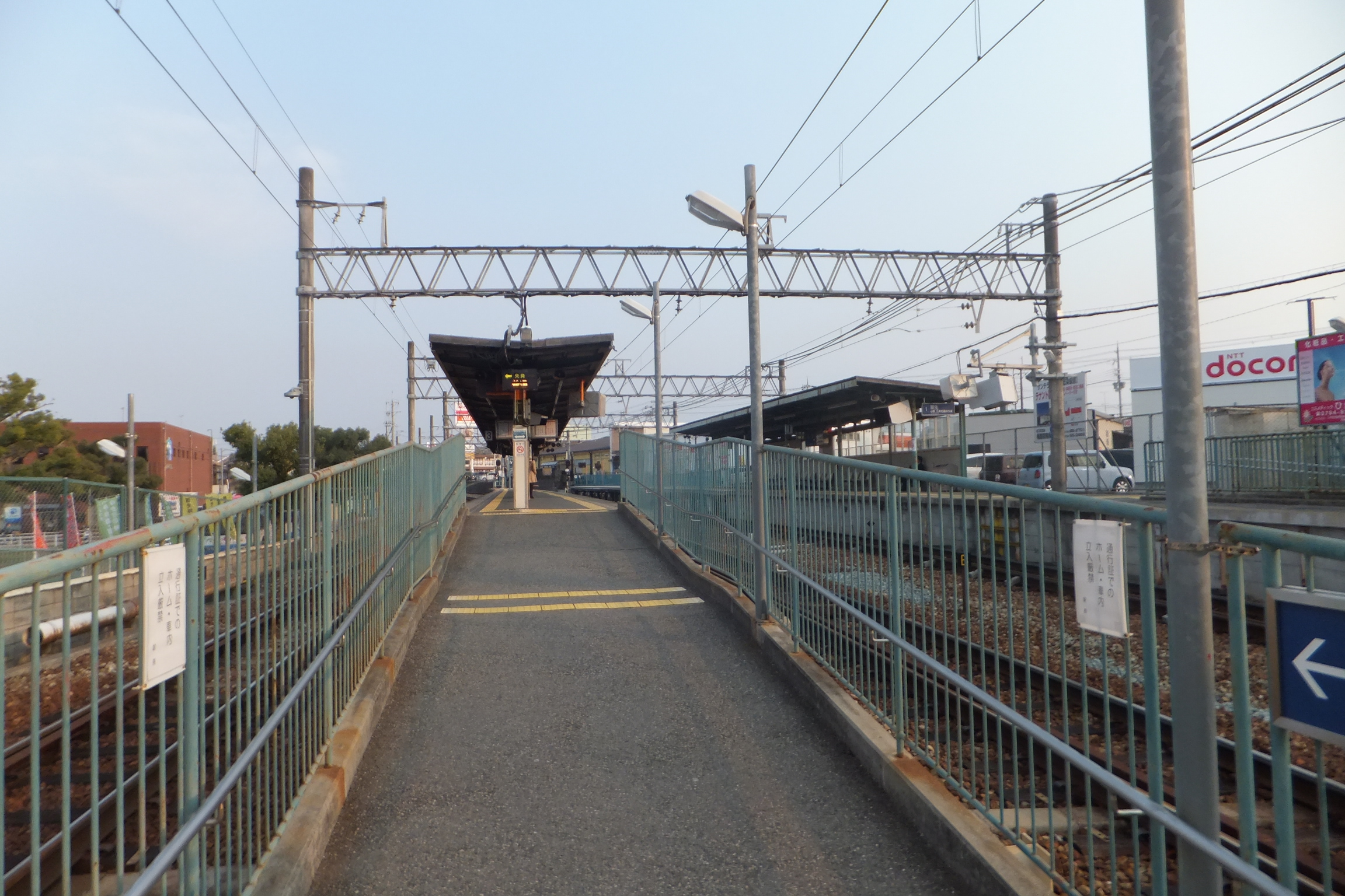 神戸電鉄粟生線志染駅